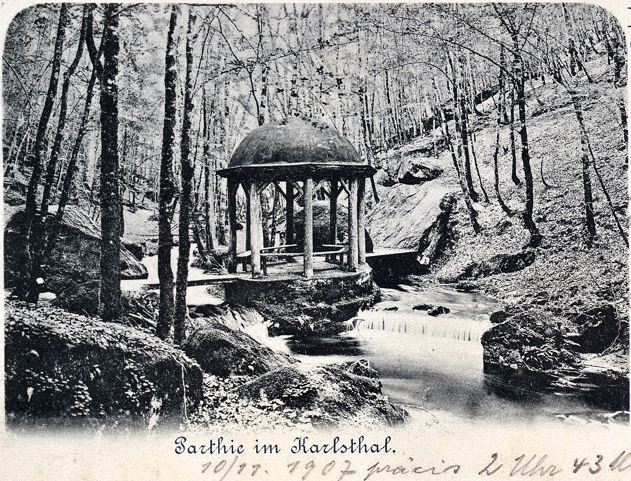 Karlstal bei Trippstadt, alter Pavillon